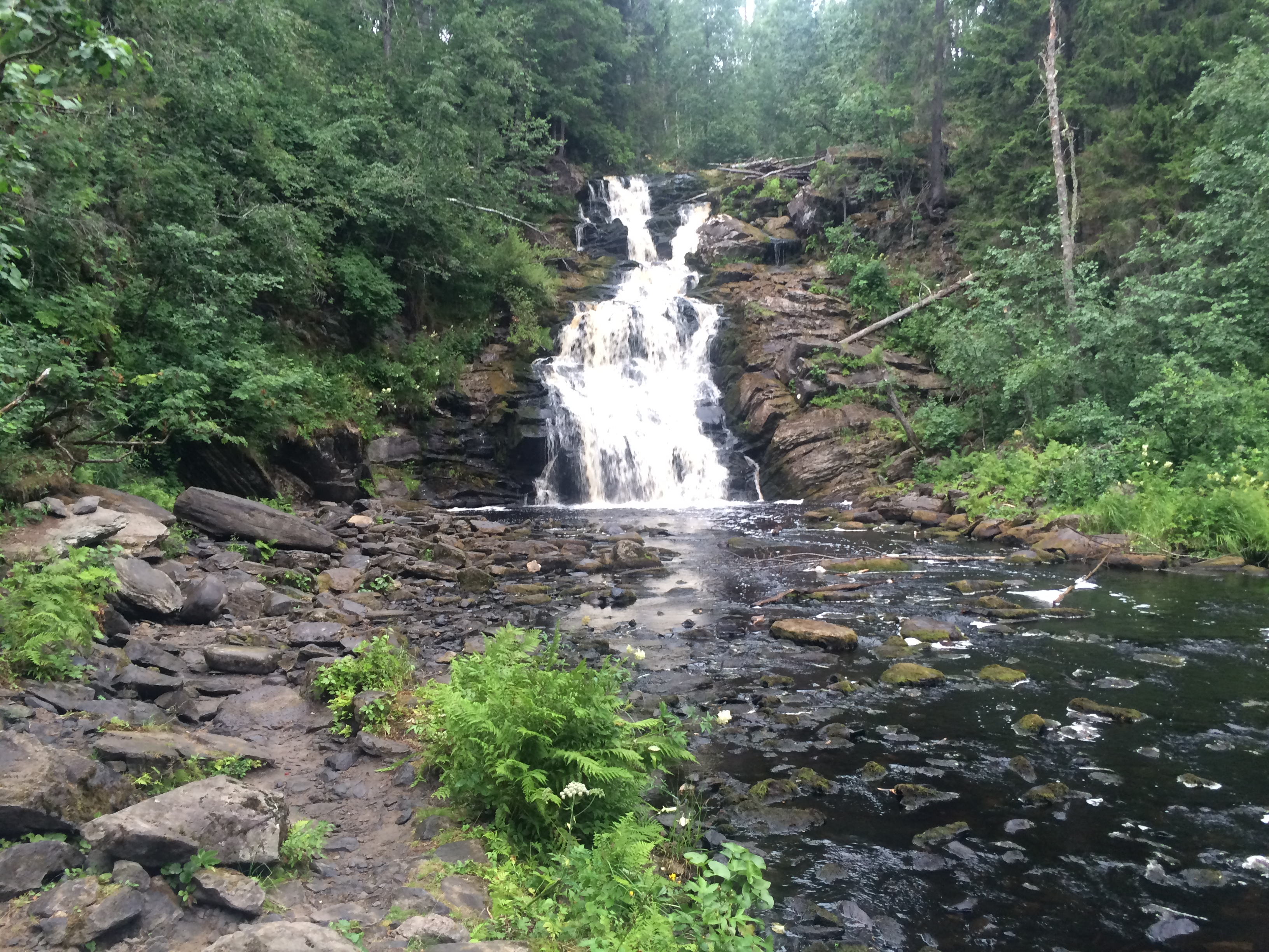 Кулисмайоки Белые мосты